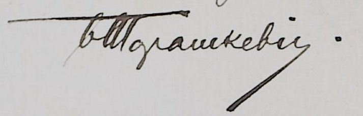 Беларуская (тарашкевіца): Подпіс Браніслава Тарашкевіча